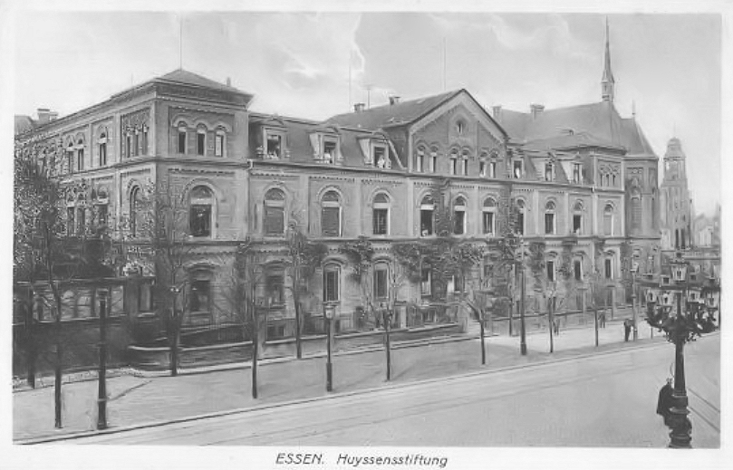 Huyssens-Stiftung in Essen um 1915